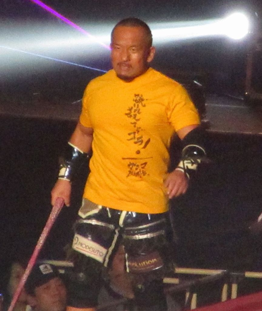 2016.11.3大阪